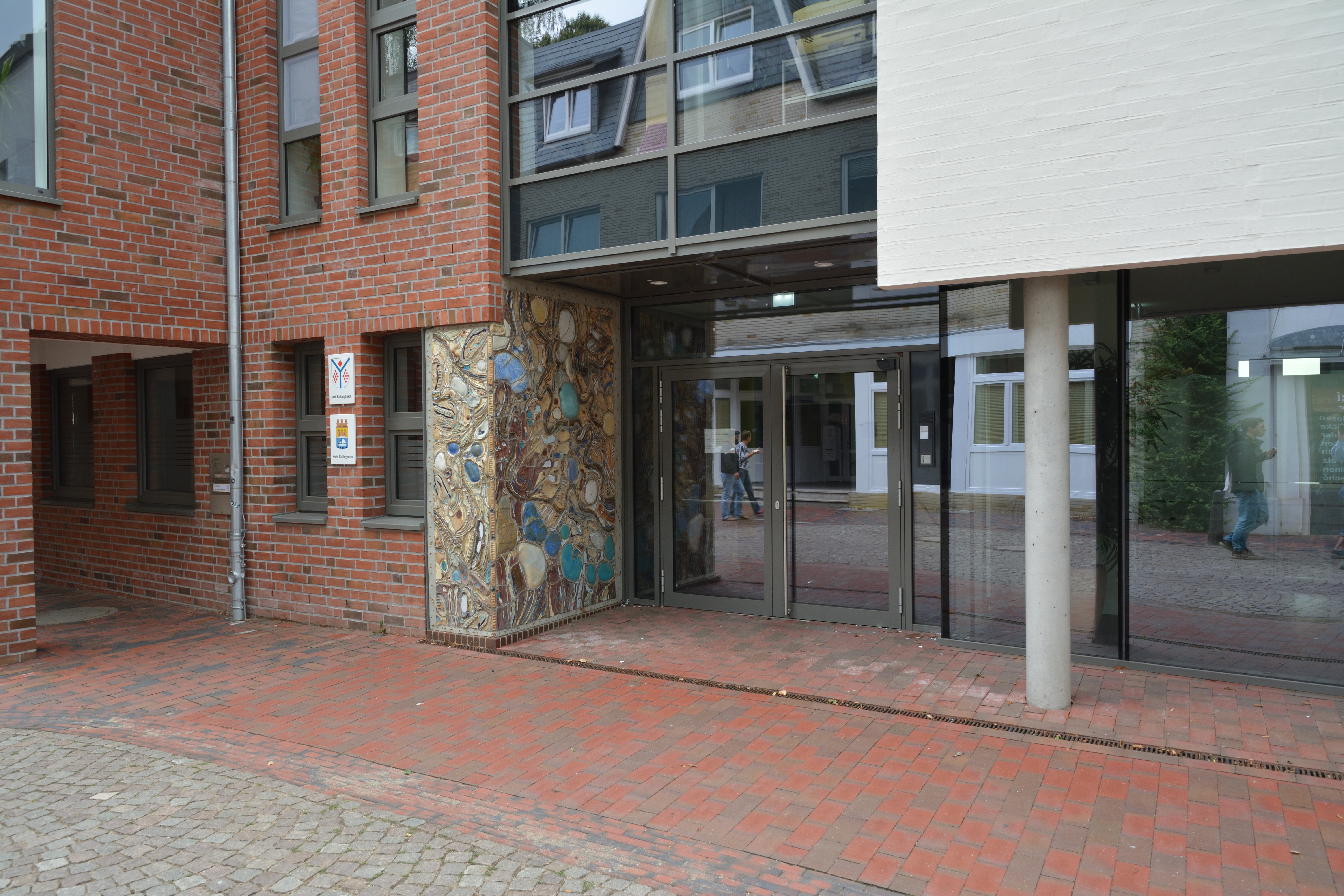 Der Haupteingang vom Rathaus Kellinghusen, gleichzeitig vom Amt Kellinghusen.Kellinghusen gilt aufgrund seiner Vergangenheit auch als "Keramikstadt".